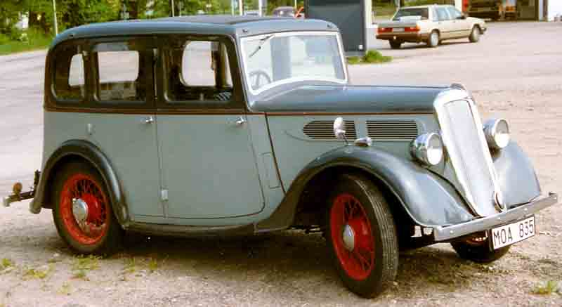 Standard Nine 4-Door Saloon 1935